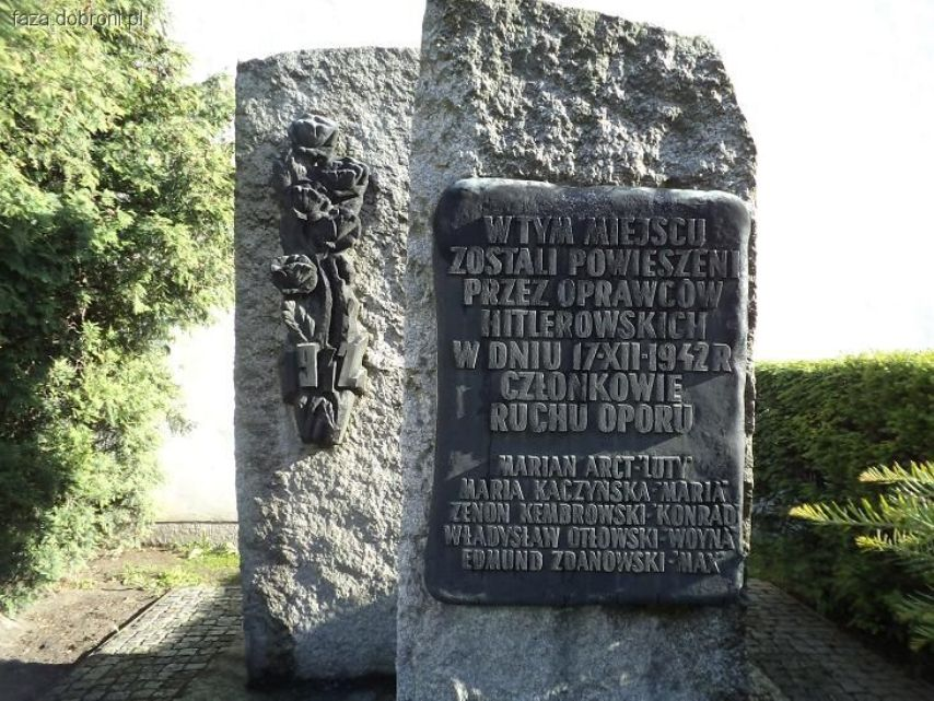 Przasnysz, 2012r. Pomnik członków ruchu oporu zamordowanych 17 grudnia 1942r.